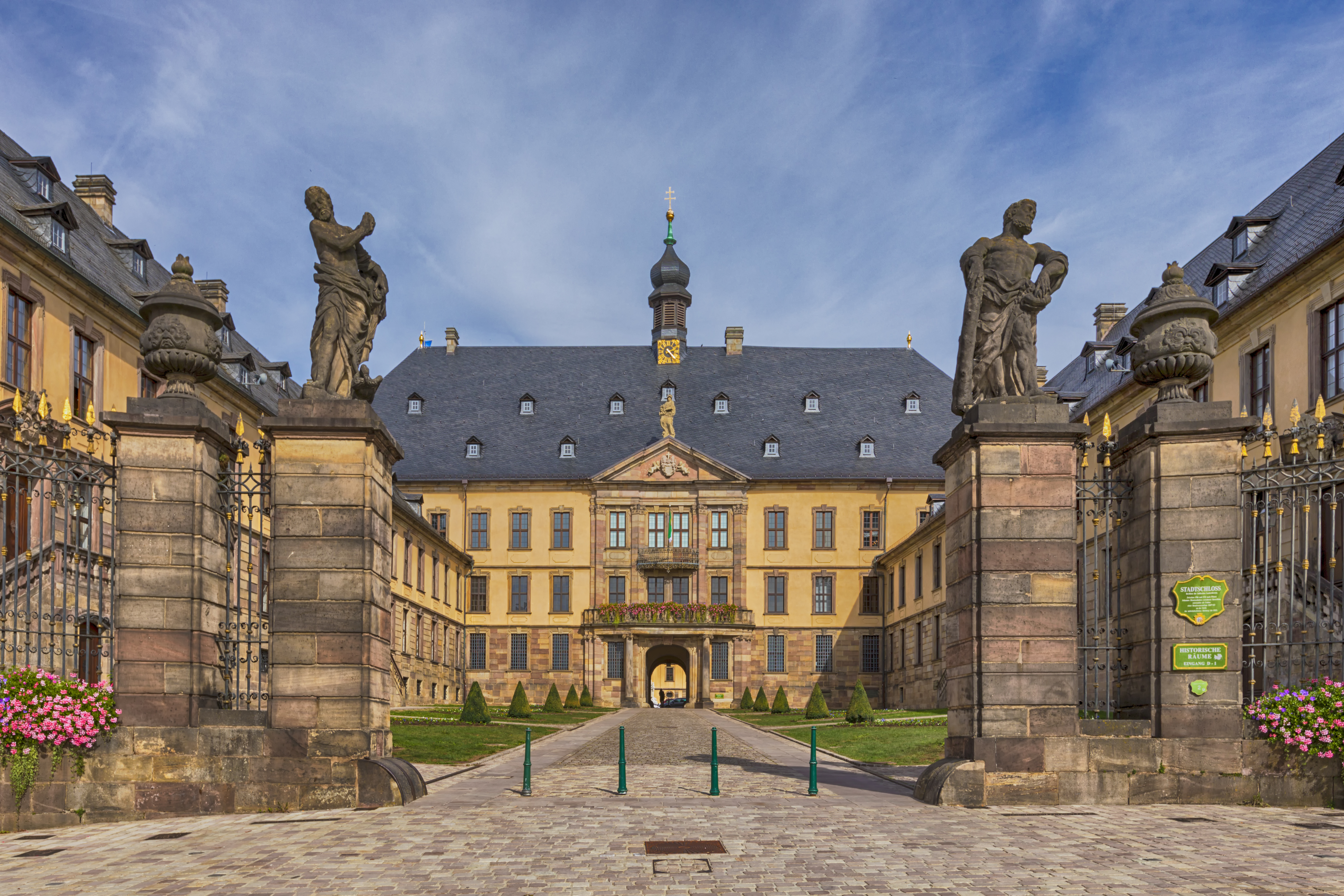 Stadtschloss Fulda, Hessen